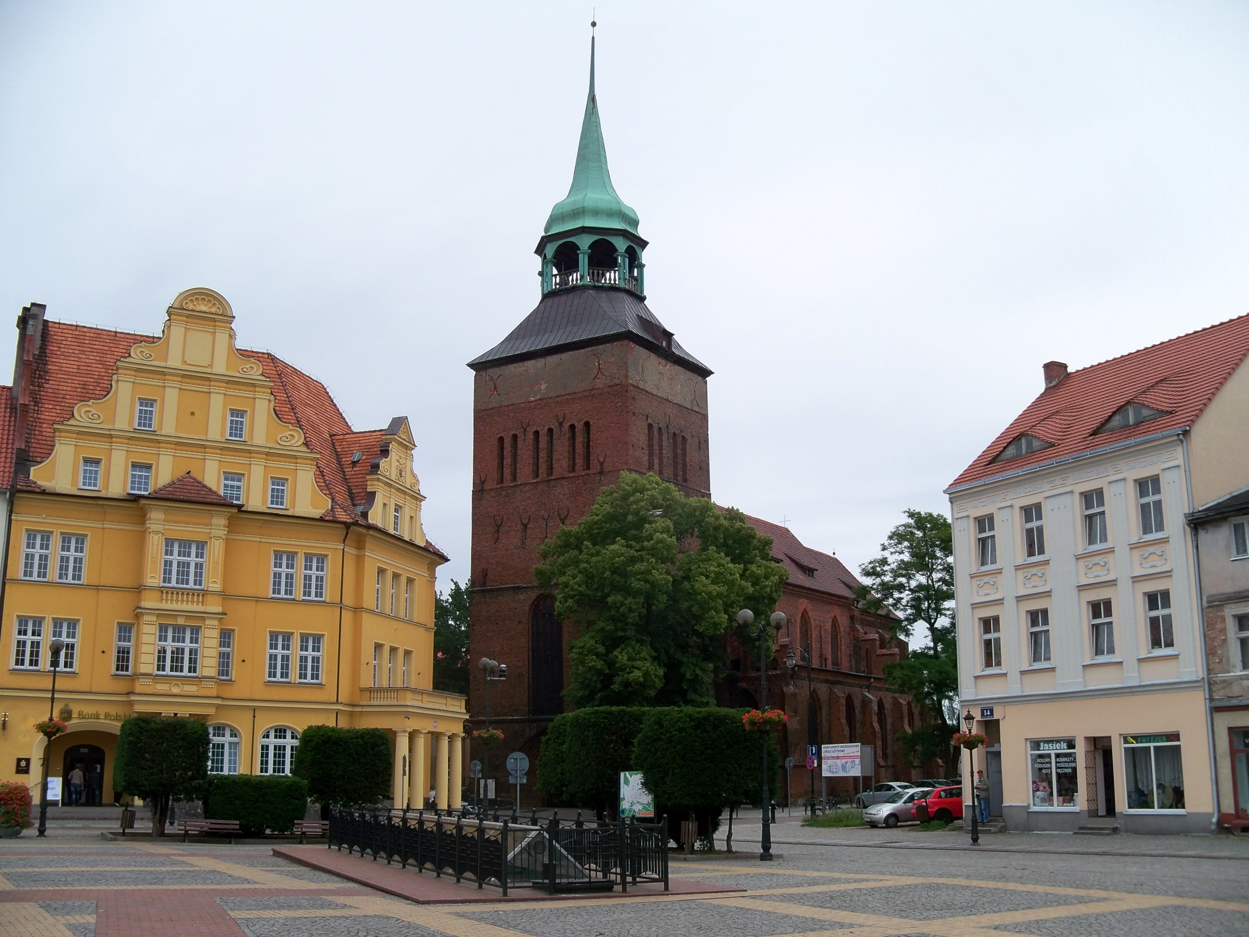 Otoczenie kościoła Narodzenia NMP.